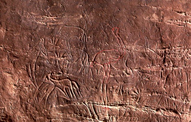 Gravures préhistoriques de la région d'El Bayadh, Algérie